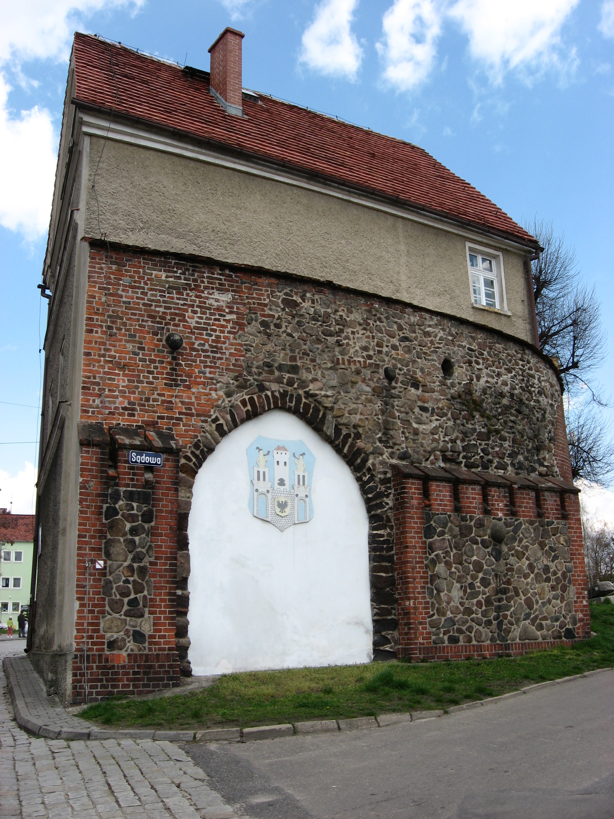 Szprotawa, Brama żagańska. Obecnie budynek muzeum.